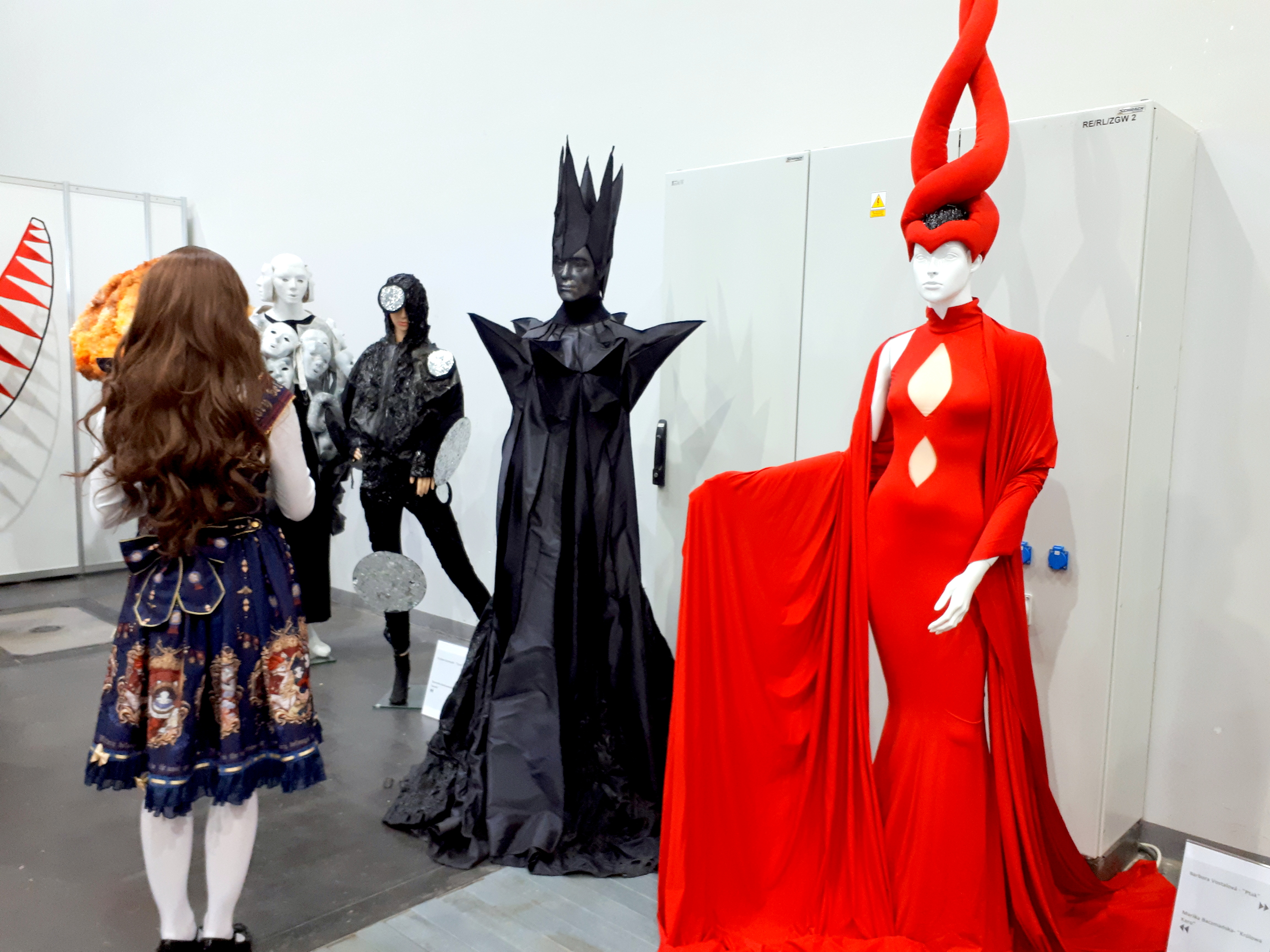 Pyrkon 2019. Wystawa modeli kostiumów wykonanych przez studentów Uniwersytetu Artystycznego w Poznaniu; Pracownia Kostiumu Teatralnego.